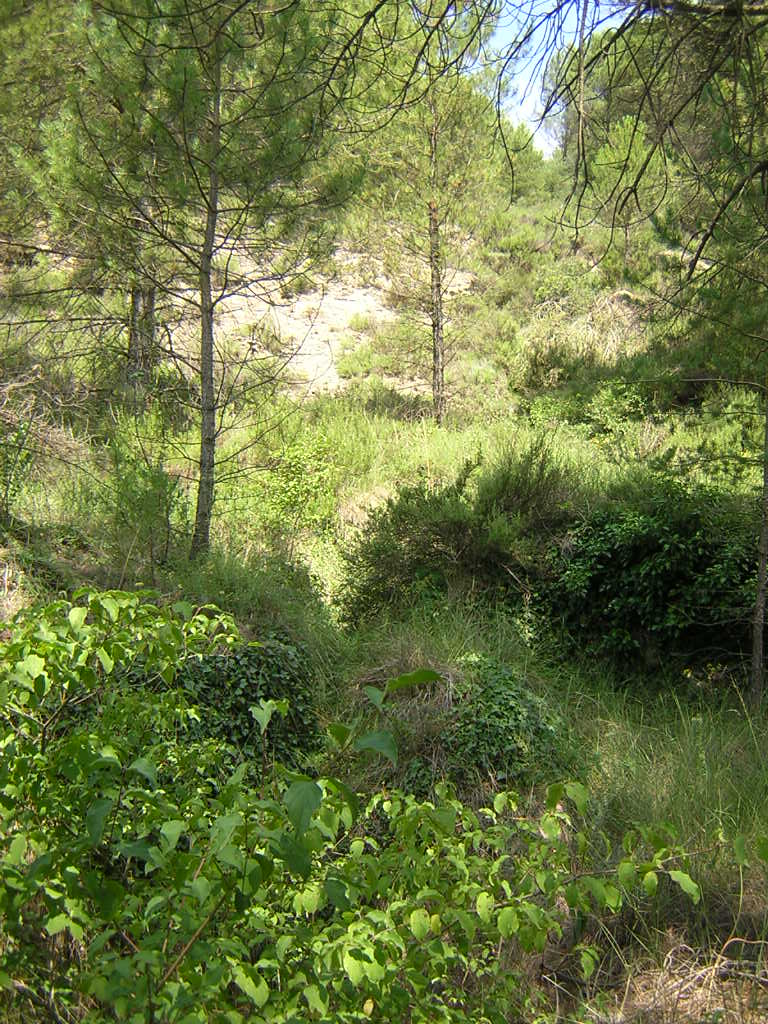 El torrent del Coll de Portella (Monistrol de Calders, Moianès)